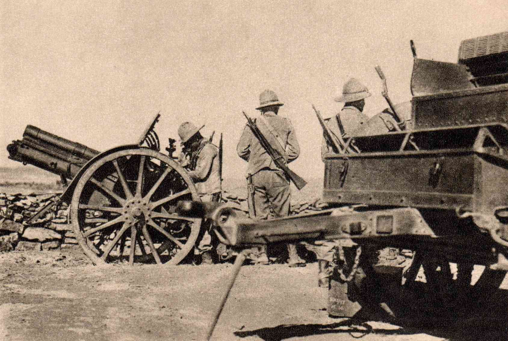 Serie:Visioni della conquista dell’Impero – Artiglieria di Corpo d'Armata in postazione nel Tembien